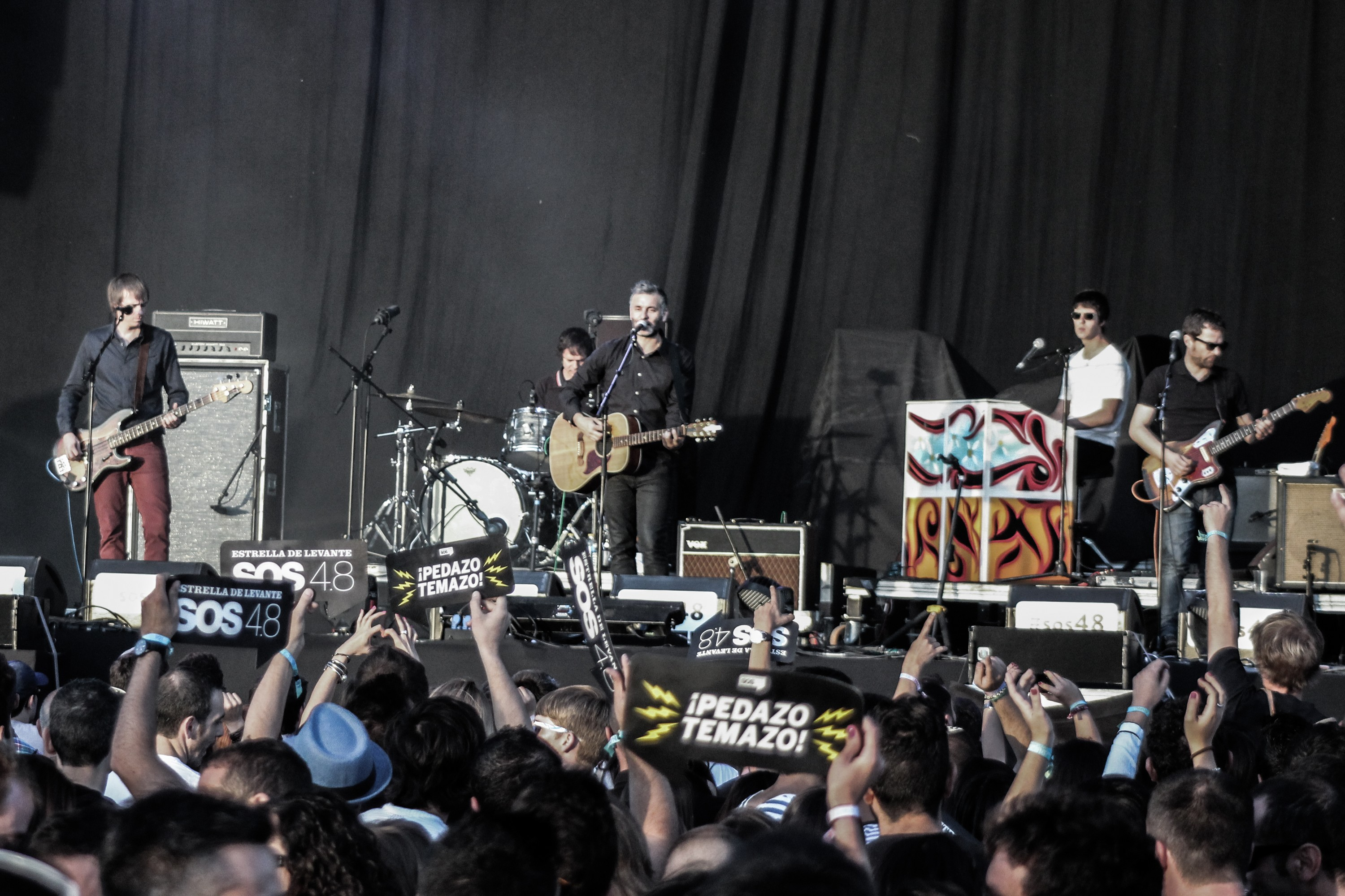 La Habitación Roja es un grupo de pop-rock indie español, originario de la localidad valenciana de L'Eliana. Está formado por Jorge Martí (vocalista y guitarra), Pau Roca (guitarra), Marc Greenwood (bajo), Jose Marco (batería) y Jordi Sapena (guitarra y teclados).